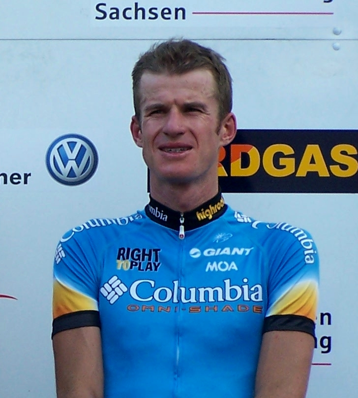 Die Aufnahme entstand beim Einzelzeitfahren der Sachsen-Tour 2008 in Großenhain